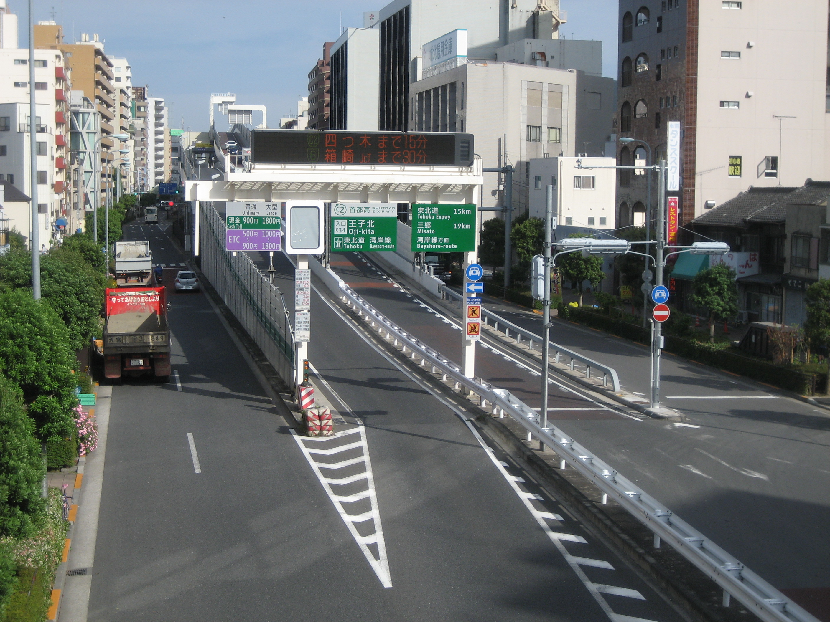 首都高速中央環状線王子北出入口（一般道との接続部付近を撮影）